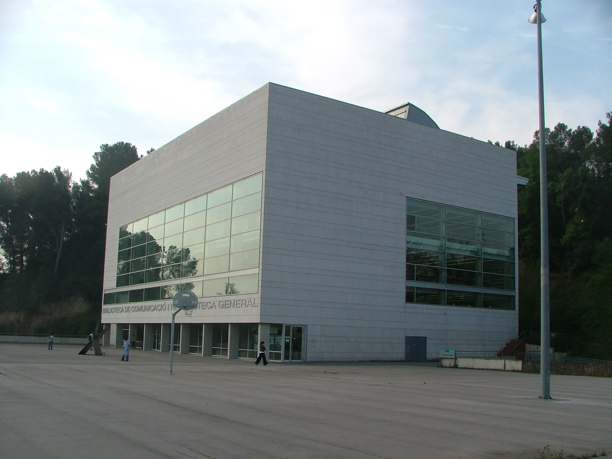 Biblioteca comunicaciò, UAB Bellaterra, Barcelona, Catalonia, Spain